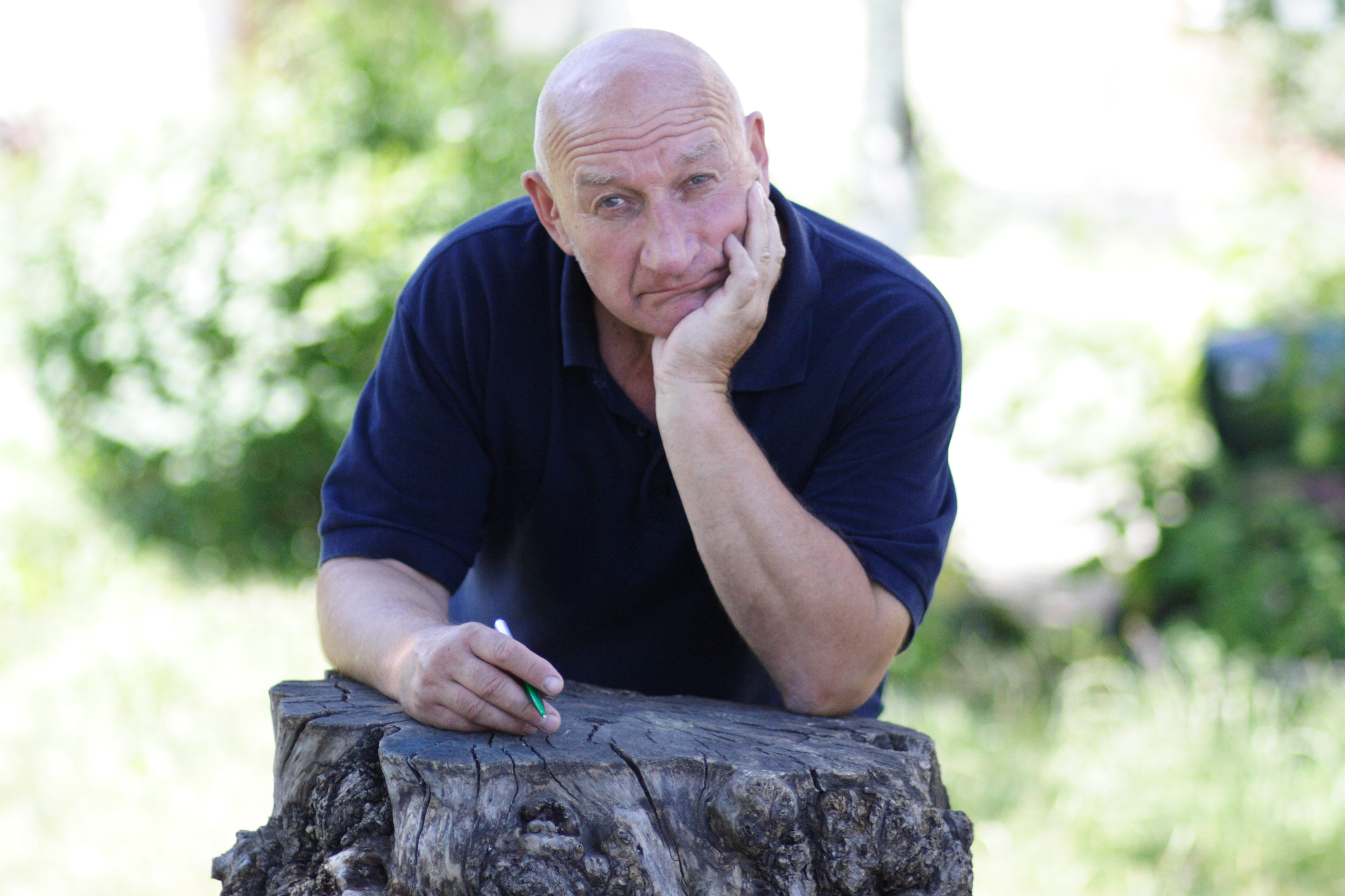 Селиверстов Владимир Иванович Писатель, краевед, юрист. Проживает в городе Тамбов, Россия.